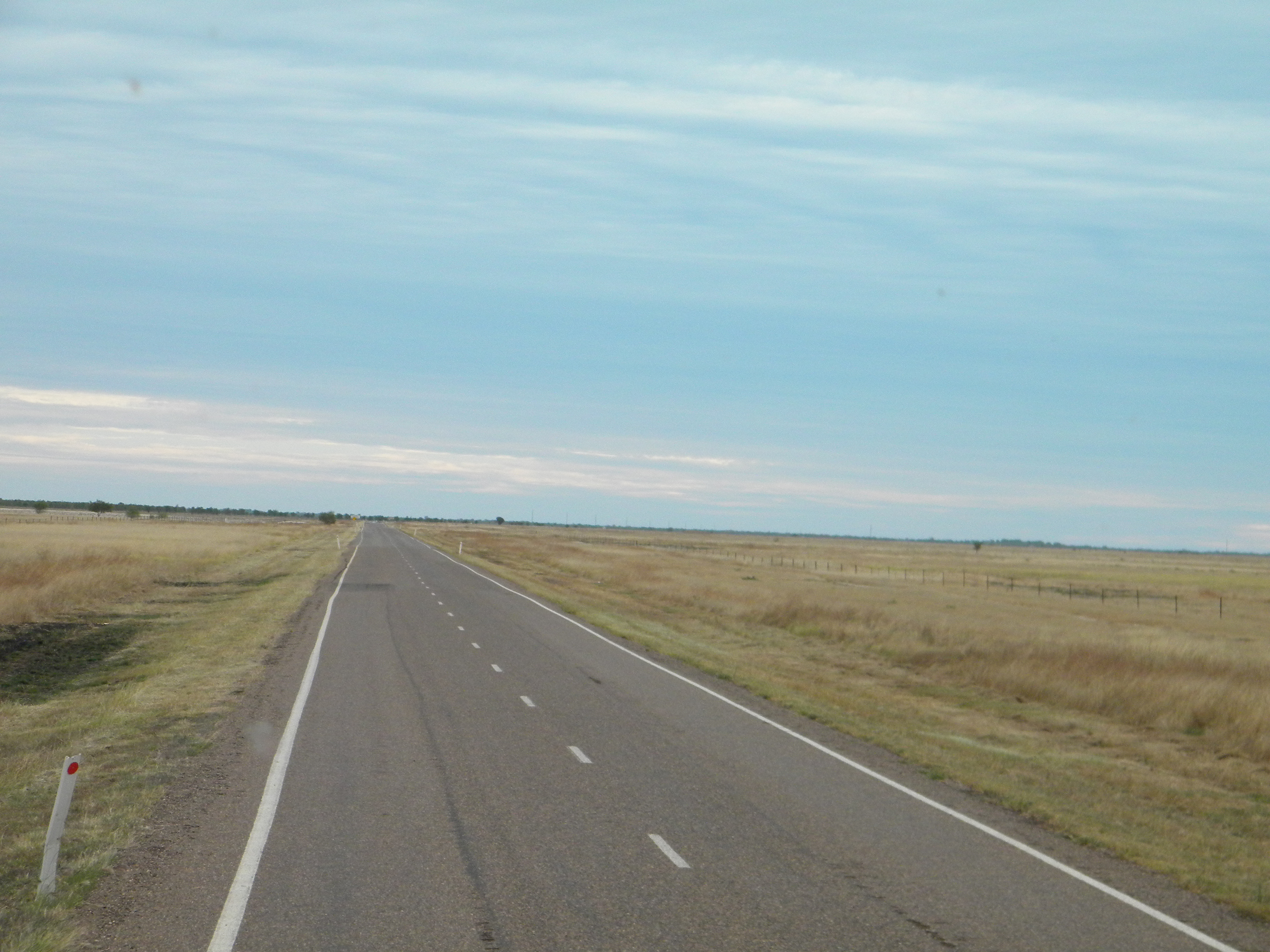 Burke Development Road